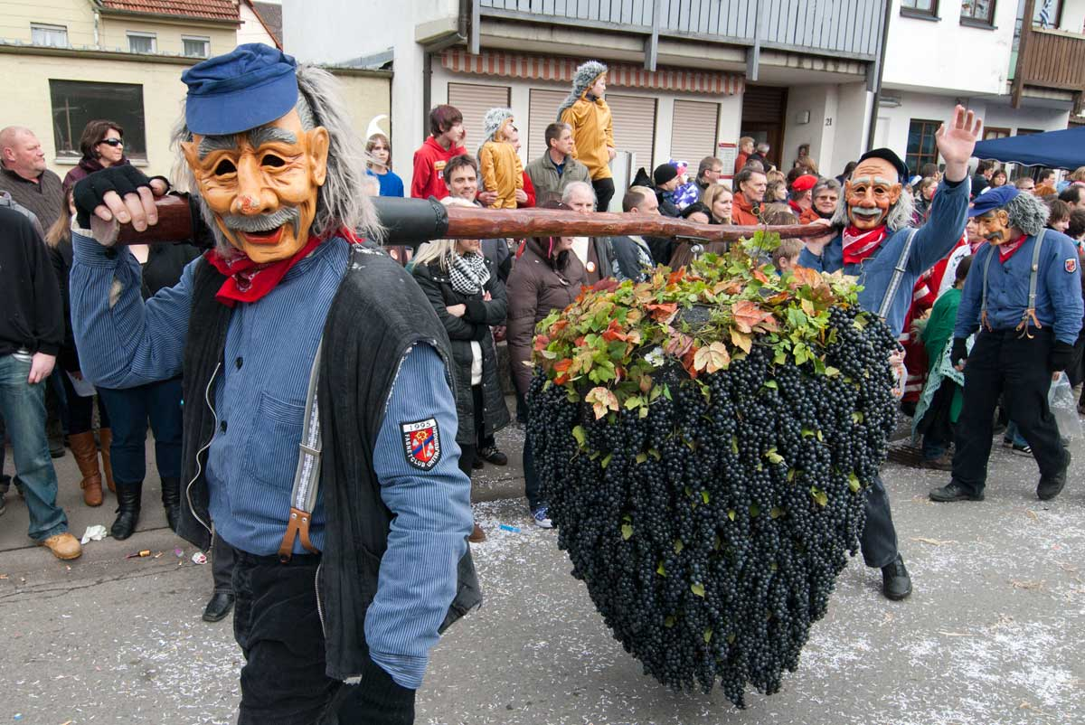 Kalebstraube des Fasnetclubs Unterjesingen im Fasnetsumzug in Rottenburg-Dettingen am 13. 2. 2011.